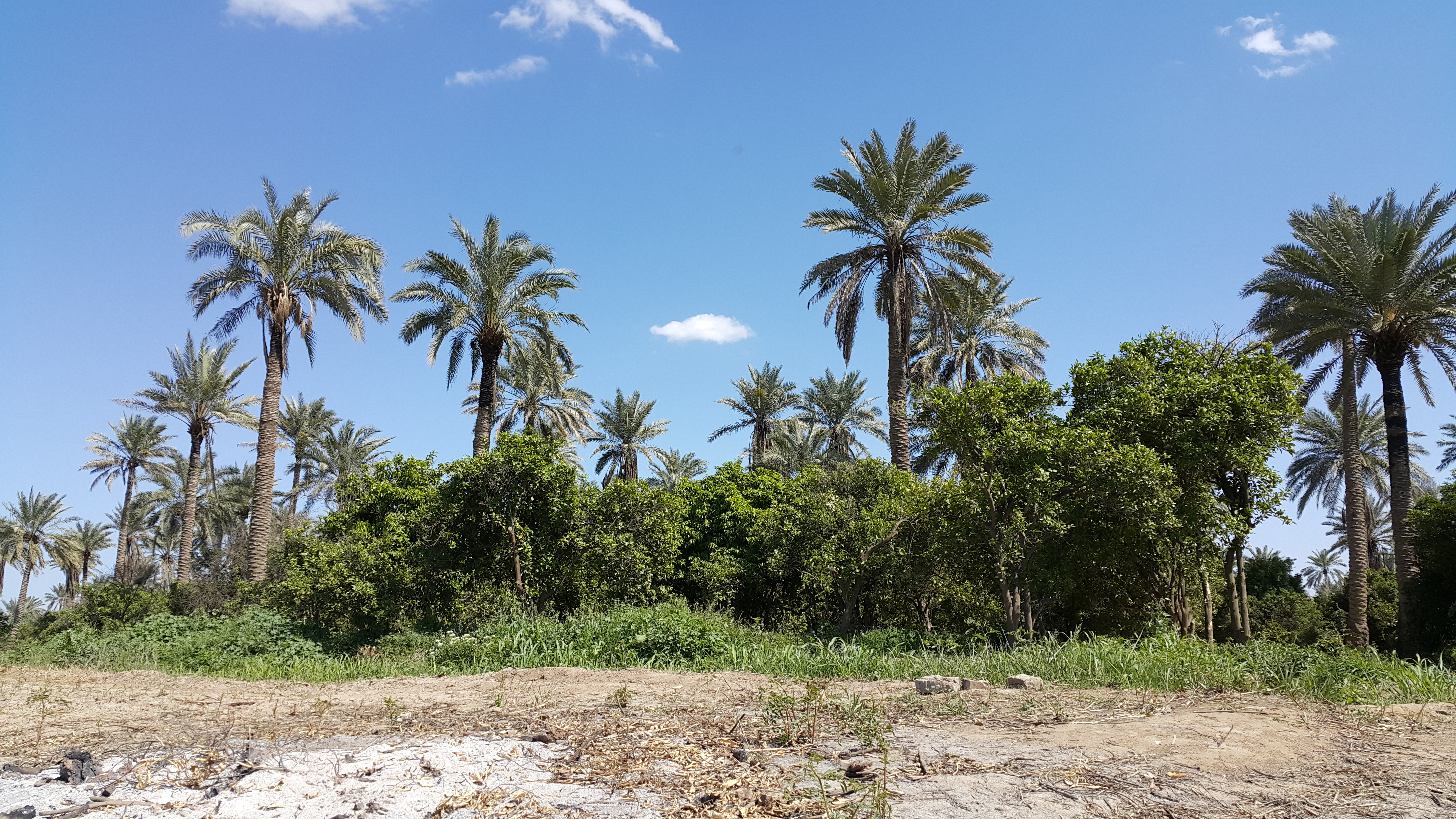 الشجرة التين والأغنام